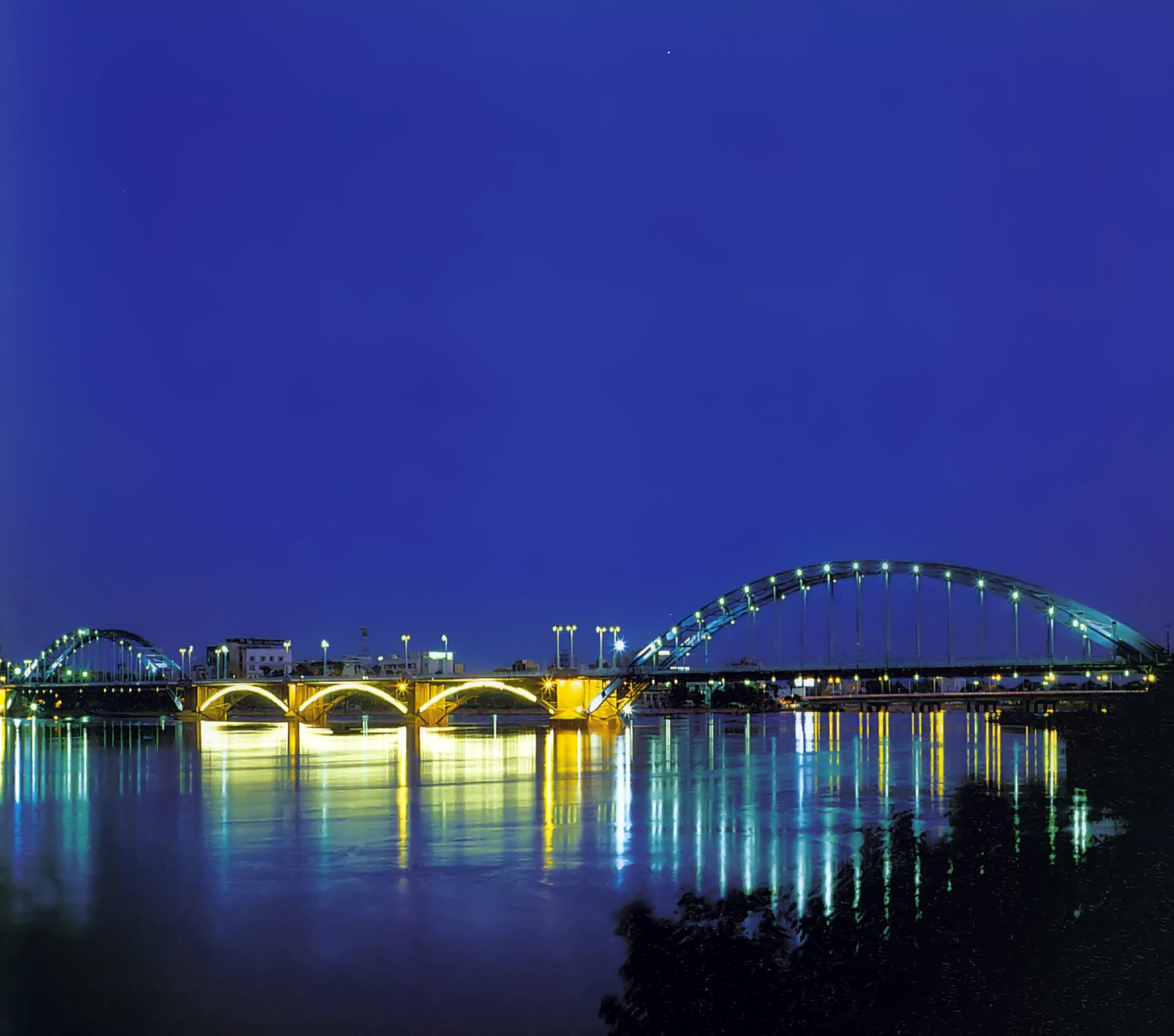 Ahvaz Bridge over Karun River at night.